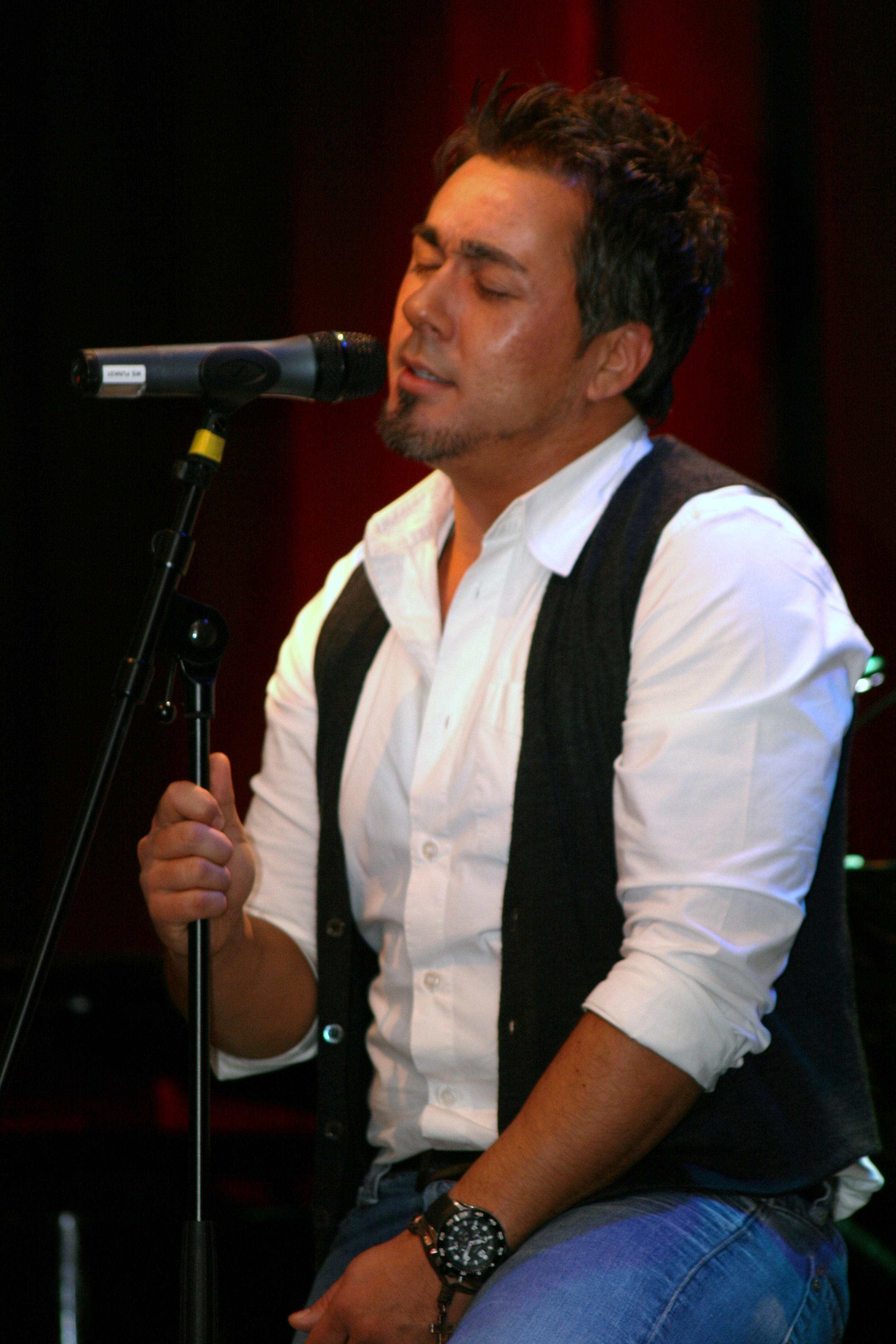 Mike Leon Grosch in Witten (20.12.2008)